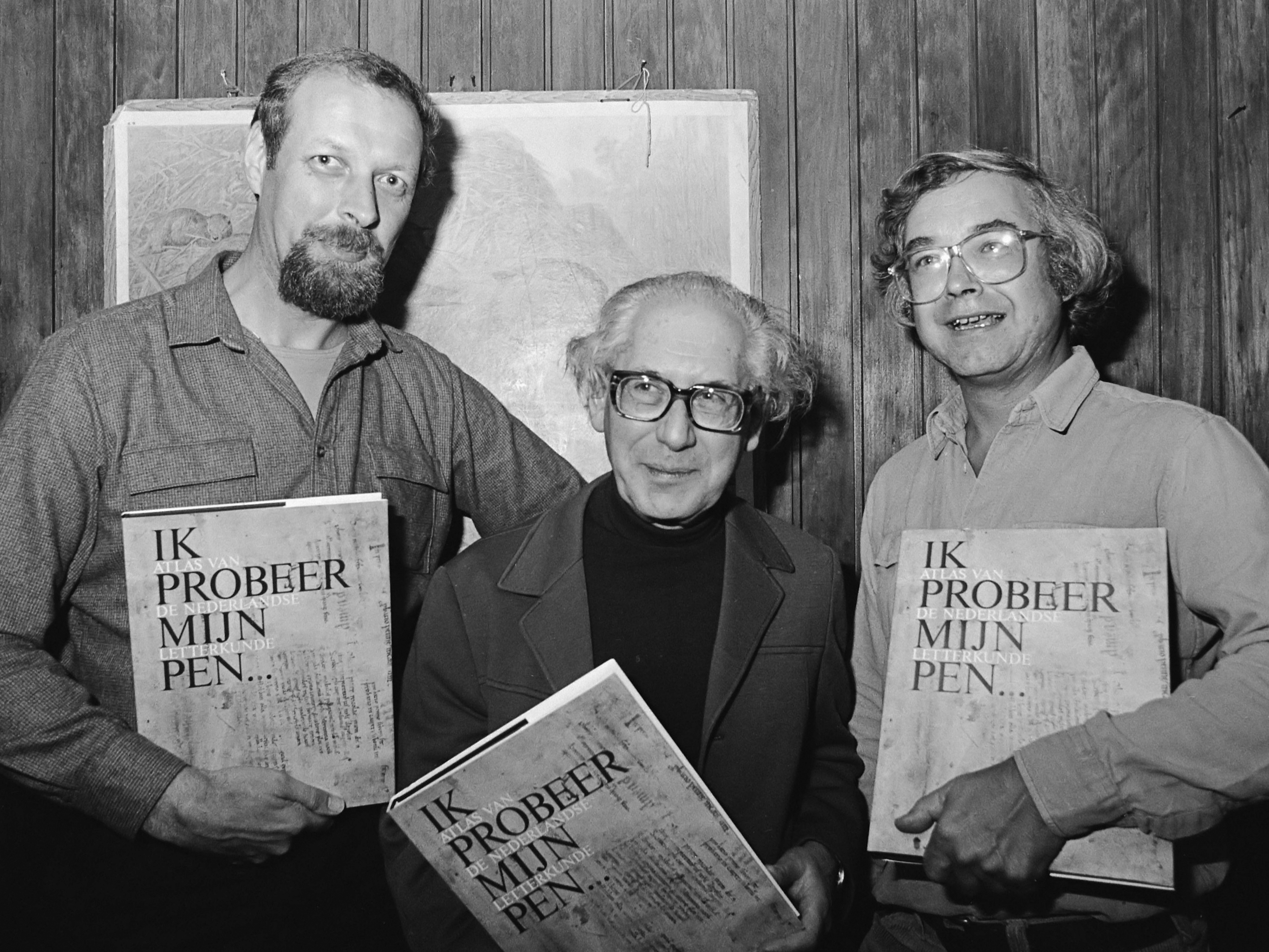 V.l.n.r. Wam de Moor, Fernand Lodewick en Kees Nieuwenhuijzen met het boek van de maand Ik probeer mijn pen 29 november 1979